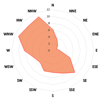 Rose des vents enregistrés à la station météorologique de Gourdon (Lot, France) entre août 2002 et septembre 2017, à raison de 2 relevés quotidiens